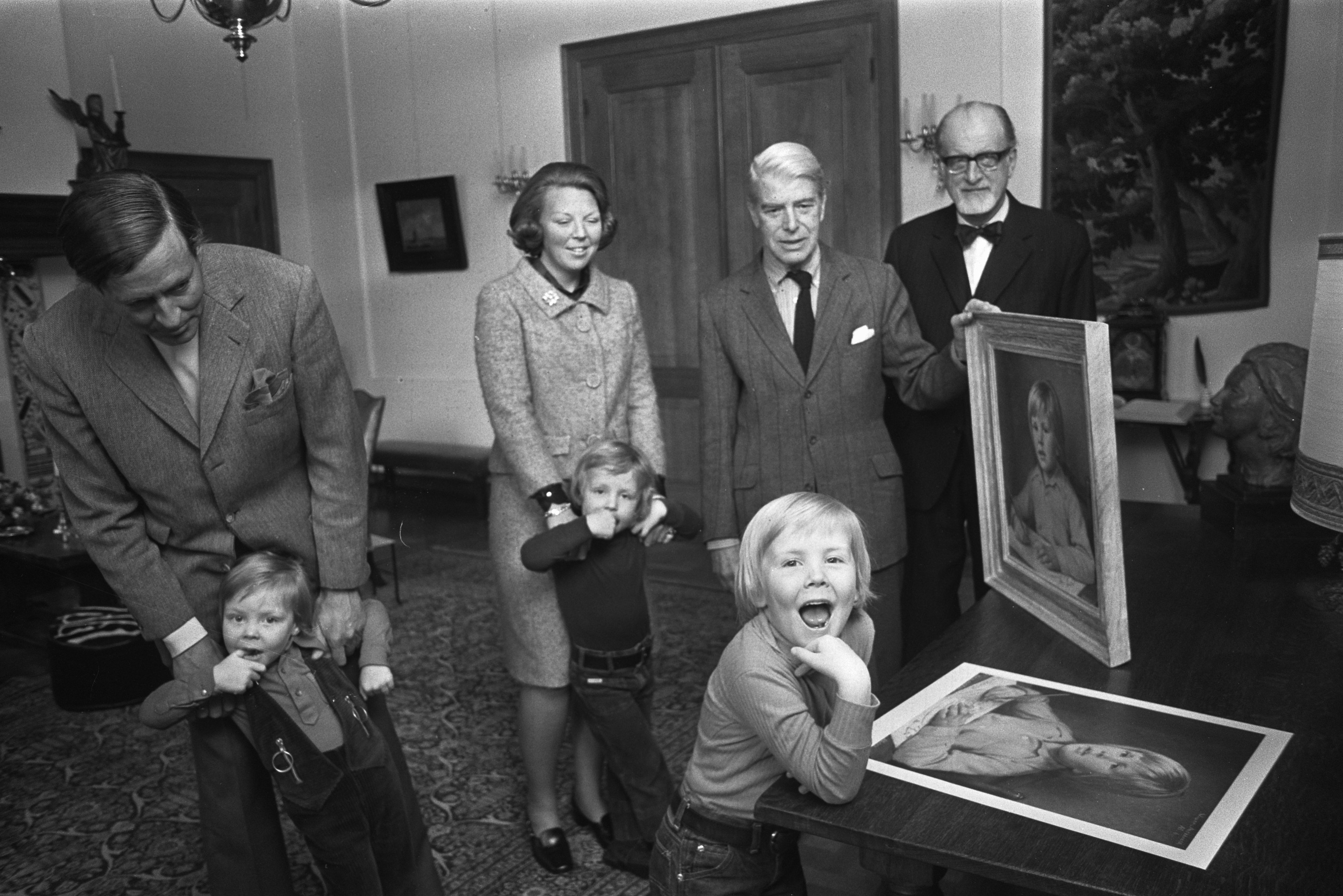 Collectie / Archief : Fotocollectie Anefo Reportage / Serie : [ onbekend ] Beschrijving : Schilderij van prins Willem Alexander t.g.v. zesde verjaardag aangeboden op Drakensteyn door schilder Karel van Veen en uitgever Ad Donker Datum : 16 april 1973 Trefwoorden : aanbiedingen, schilderijen Persoonsnaam : Willem-Alexander, Prins van Oranje Fotograaf : Verhoeff, Bert / Anefo Auteursrechthebbende : Nationaal Archief Materiaalsoort : Negatief (zwart/wit) Nummer archiefinventaris : bekijk toegang 2.24.01.05 Bestanddeelnummer : 926-3490